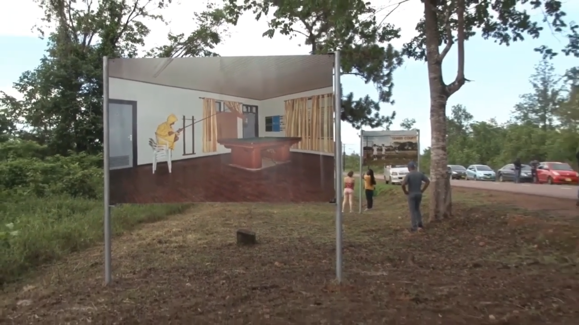 Roosje Verschoor in Moengo